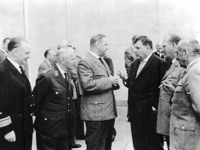 Note: This description has been identified as biased or incorrect: DDR-Propaganda-Sprache/GDR propaganda language. Zentralbild 9.6.1961 Verteidigungsminister Strauß sichert Atomausrüstung zu Die atomare Ausrüstung der Bundeswehr hat der Bonner Verteidigungsminister Strauß am 8.6.1961 auf einem Generalstreffen in Stuttgart als unverändert gültig bezeichnet. Das sagte Strauß vor ehemaligen hohen Nazi-Offizieren, die heute in der Bundeswehr wieder führende Positionen einnehmen. UBz.: Auf der Terrasse der Stadthalle in Fellbach bei Stuttgart (v.l.n.r.) Konteradmiral Zenker, General Kammhuber, General Schnez, Verteidigungsminister Strauß, General Speidel und General Foertsch.